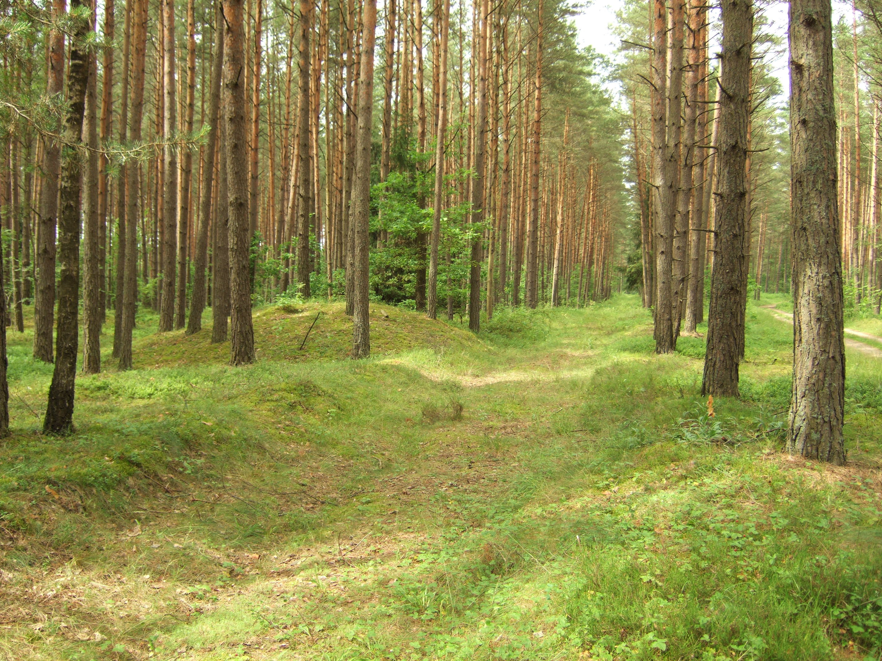 Paaliosės pilkapiai